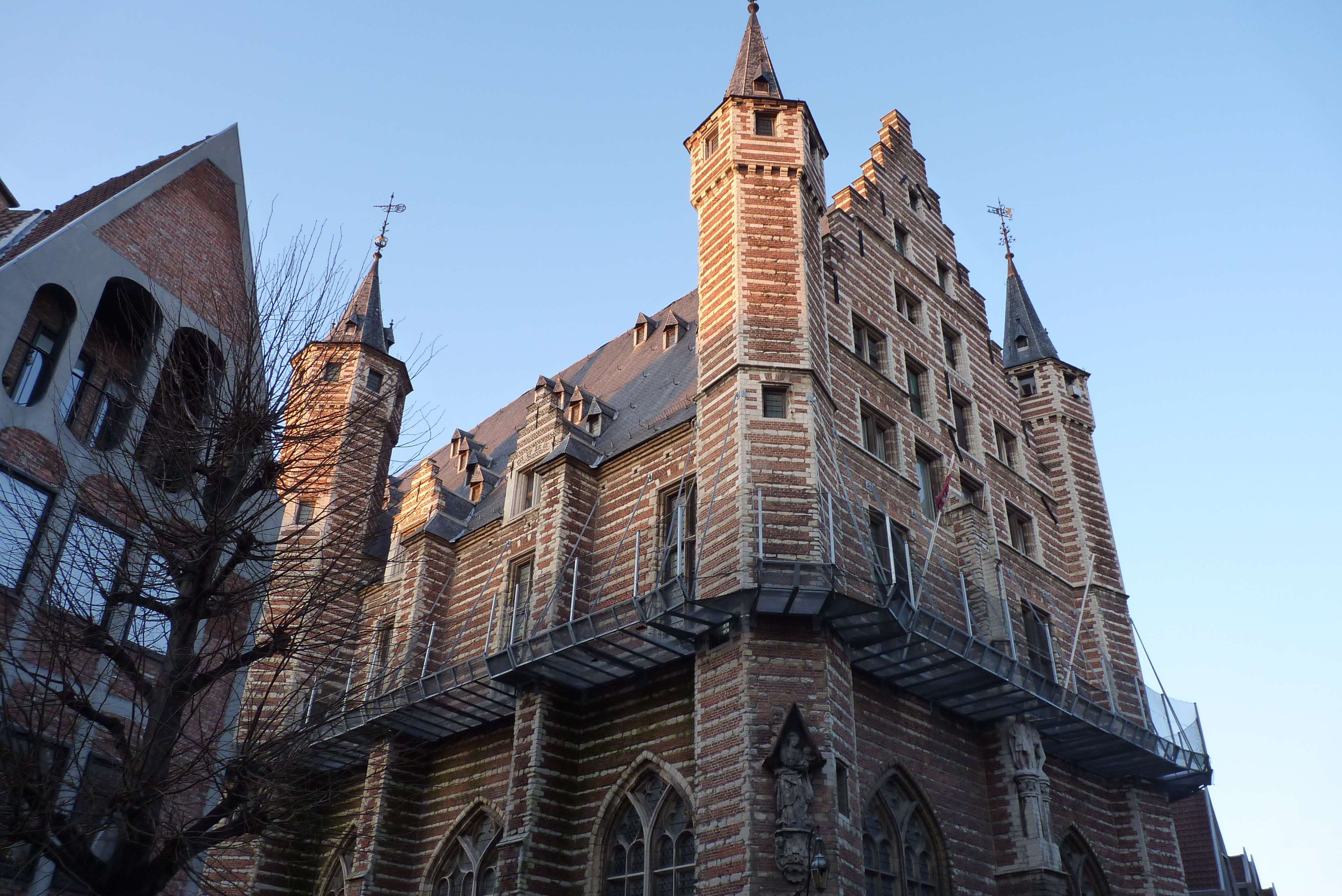 Cette image a été créée par Savant-fou Elle est donc sous licence libre. Si jamais vous avez besoin d'autres clichés sur ce thème, contactez-moi ! Merci de créditer: Image de Savant-fou ( - //commons.wikimedia.org/wiki/File:Antwerp_Vleeshuis_3.jpg). If you need other pictures about this subject, please feel free to contact me. Please credit : Picture of Savant-fou ( - //commons.wikimedia.org/wiki/File:Antwerp_Vleeshuis_3.jpg).